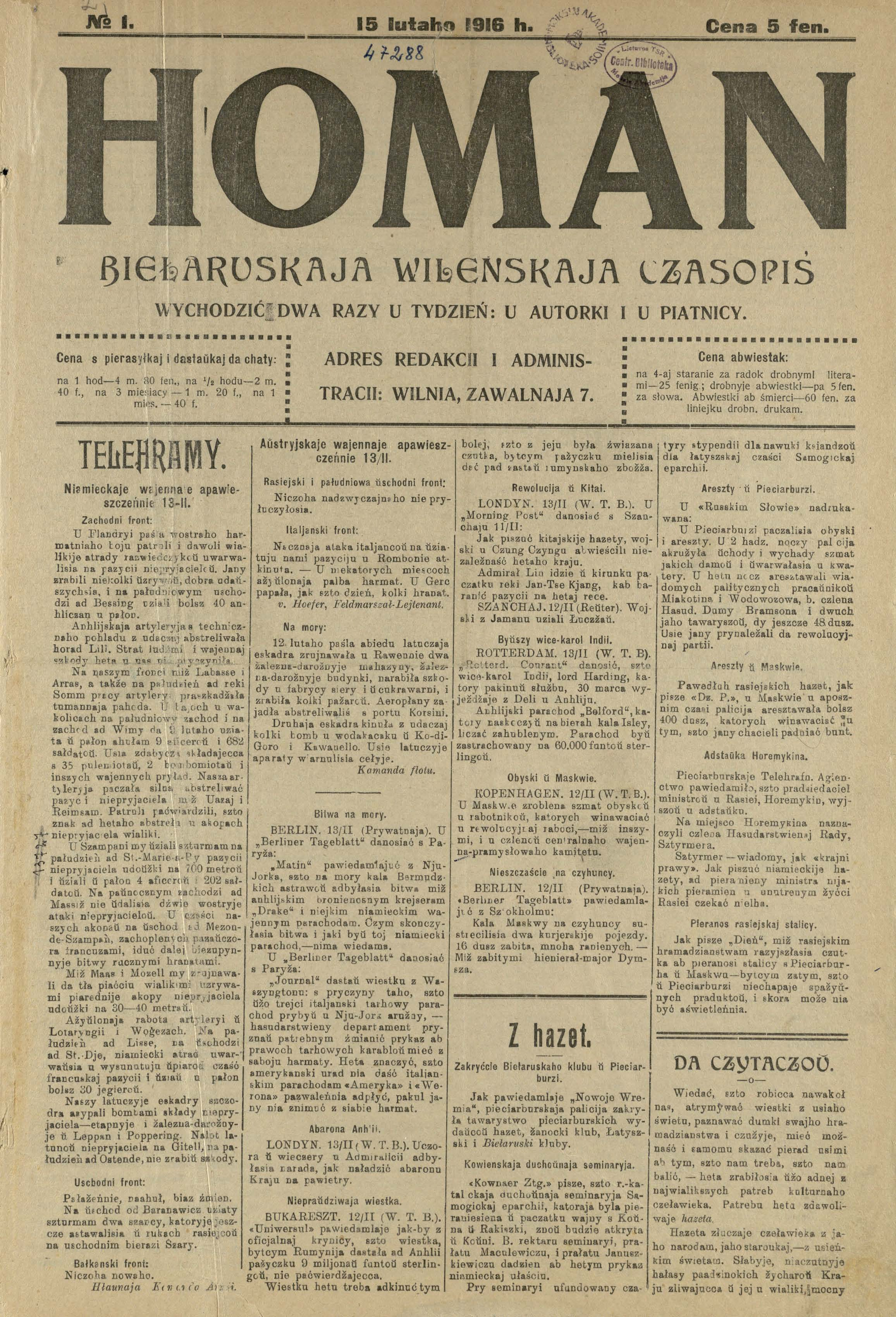 Газета Гоман (Homan) № 1.